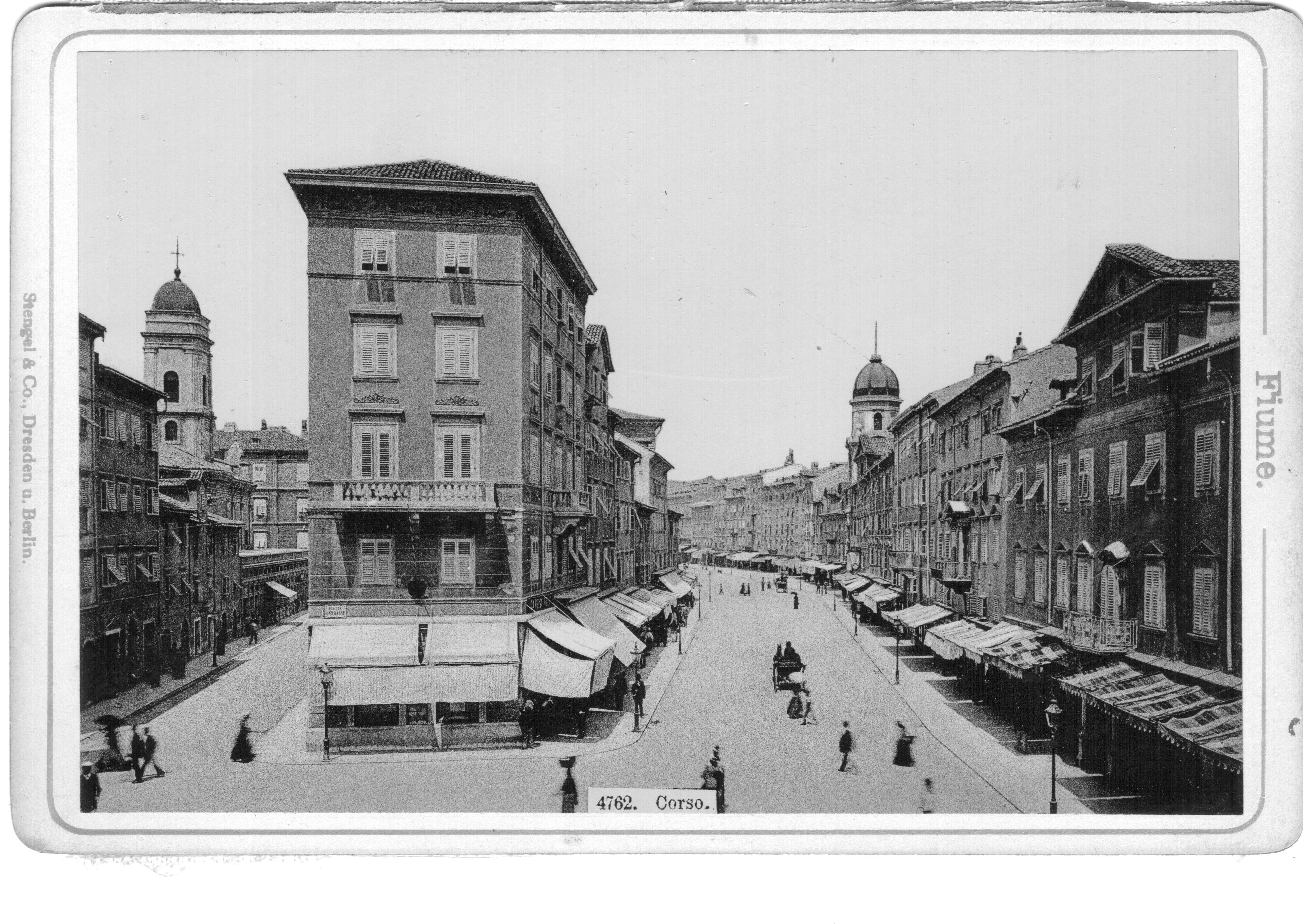 Magyar Királyság, Fiume. Edoardo Schambik fényképész. PD-old. A FIUME című fényképalbum 12, fehér vászonnal összefűzött fényképe közül az utolsó fénykép hátoldalára ragasztott kék-fehér bélyeg szövege a következő: EDOARDO SCHAMBIK FIUME Corso No 13.